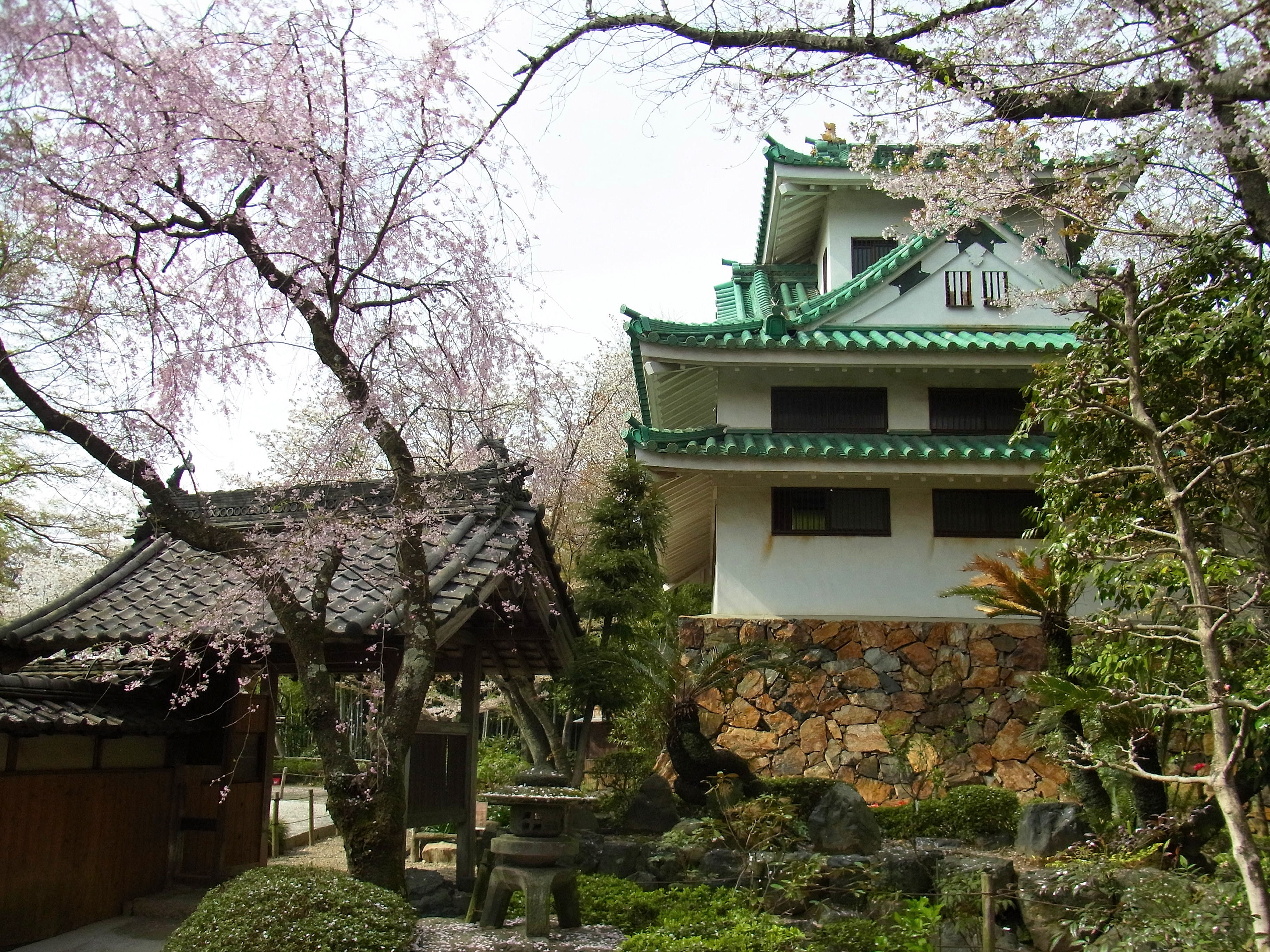 龍泉寺城摸擬天守